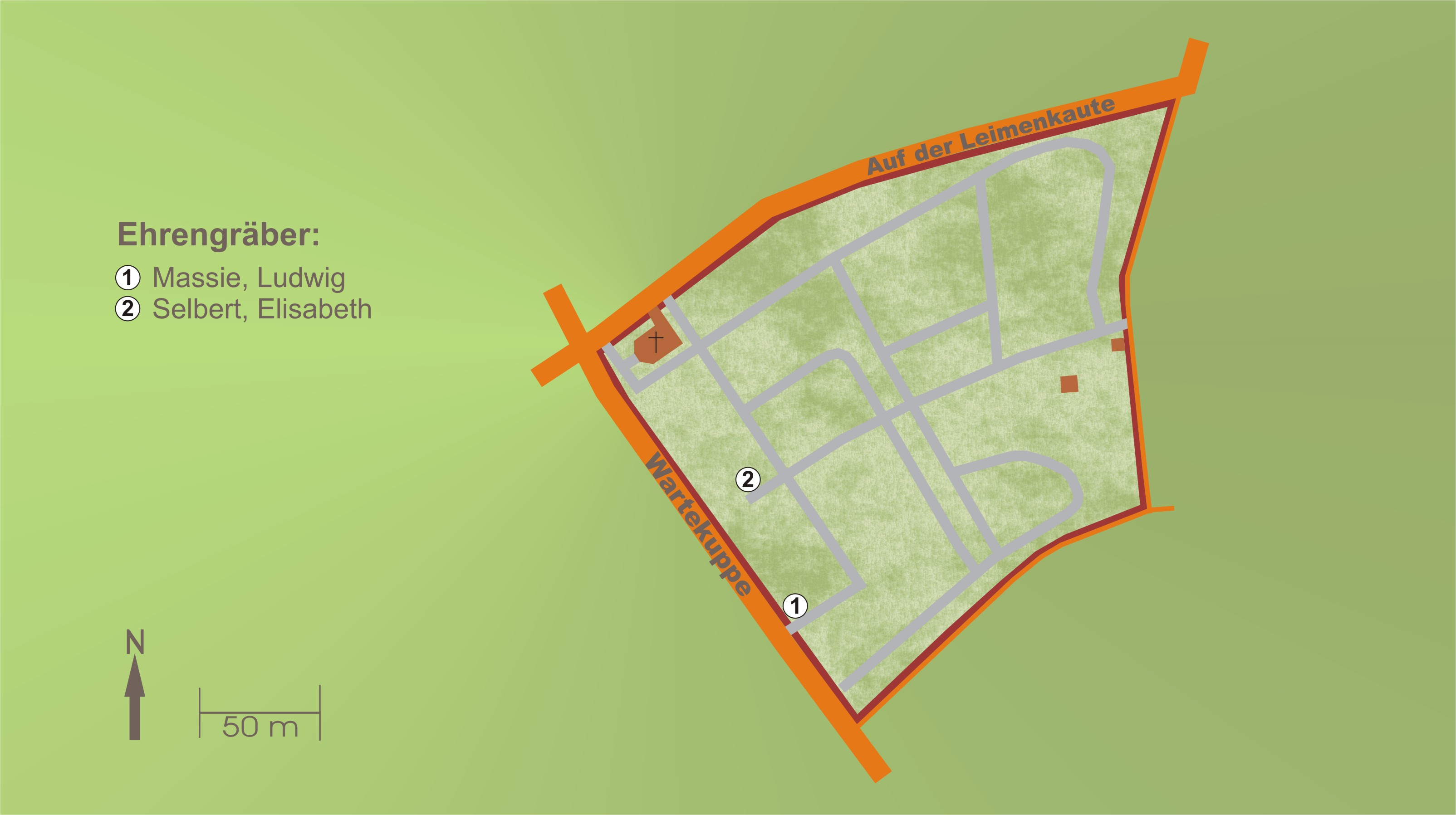 Plan des Friedhofs in Kassel-Niederzwehren (Deutschland)